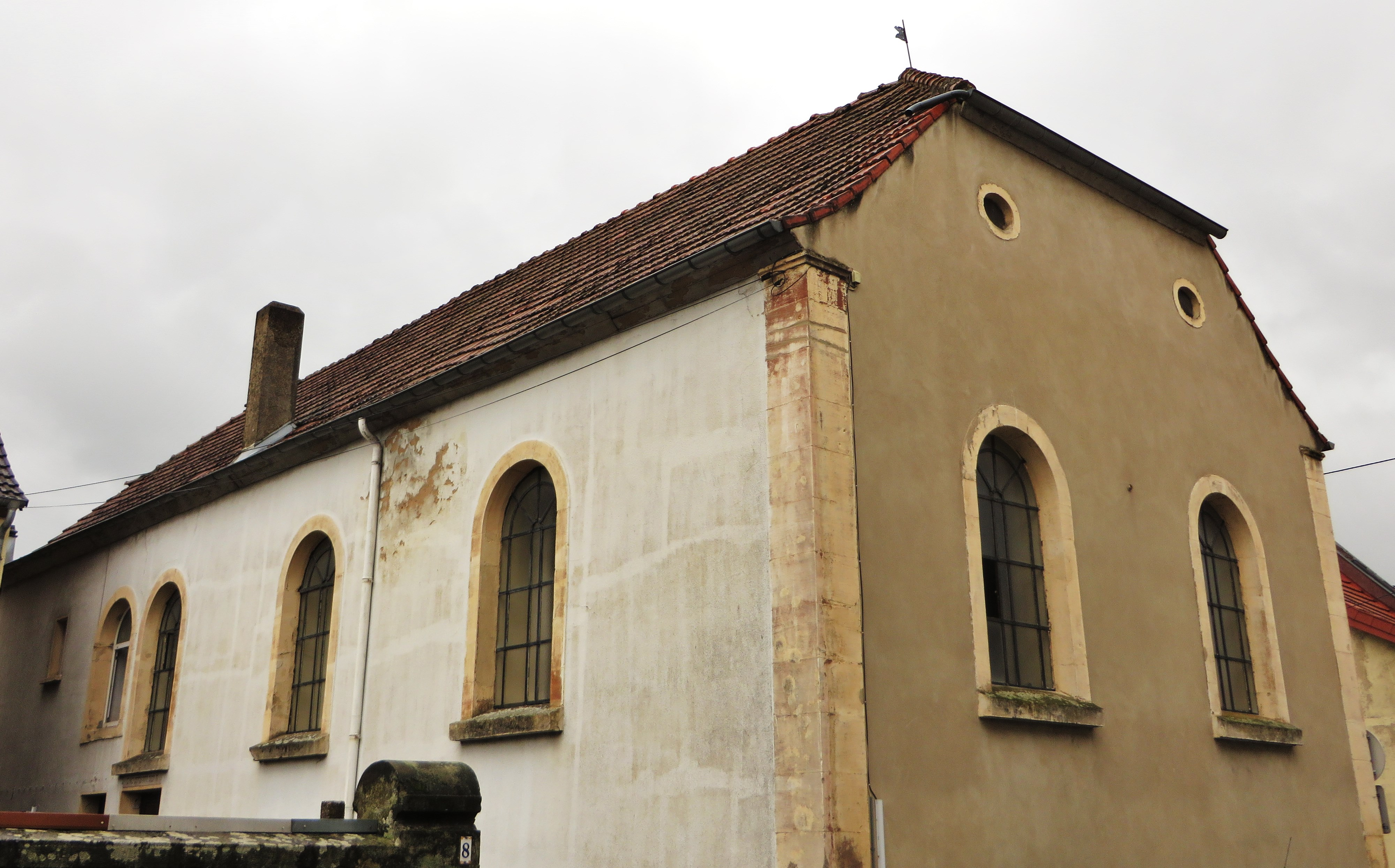 Grosbliederstroff synagogue